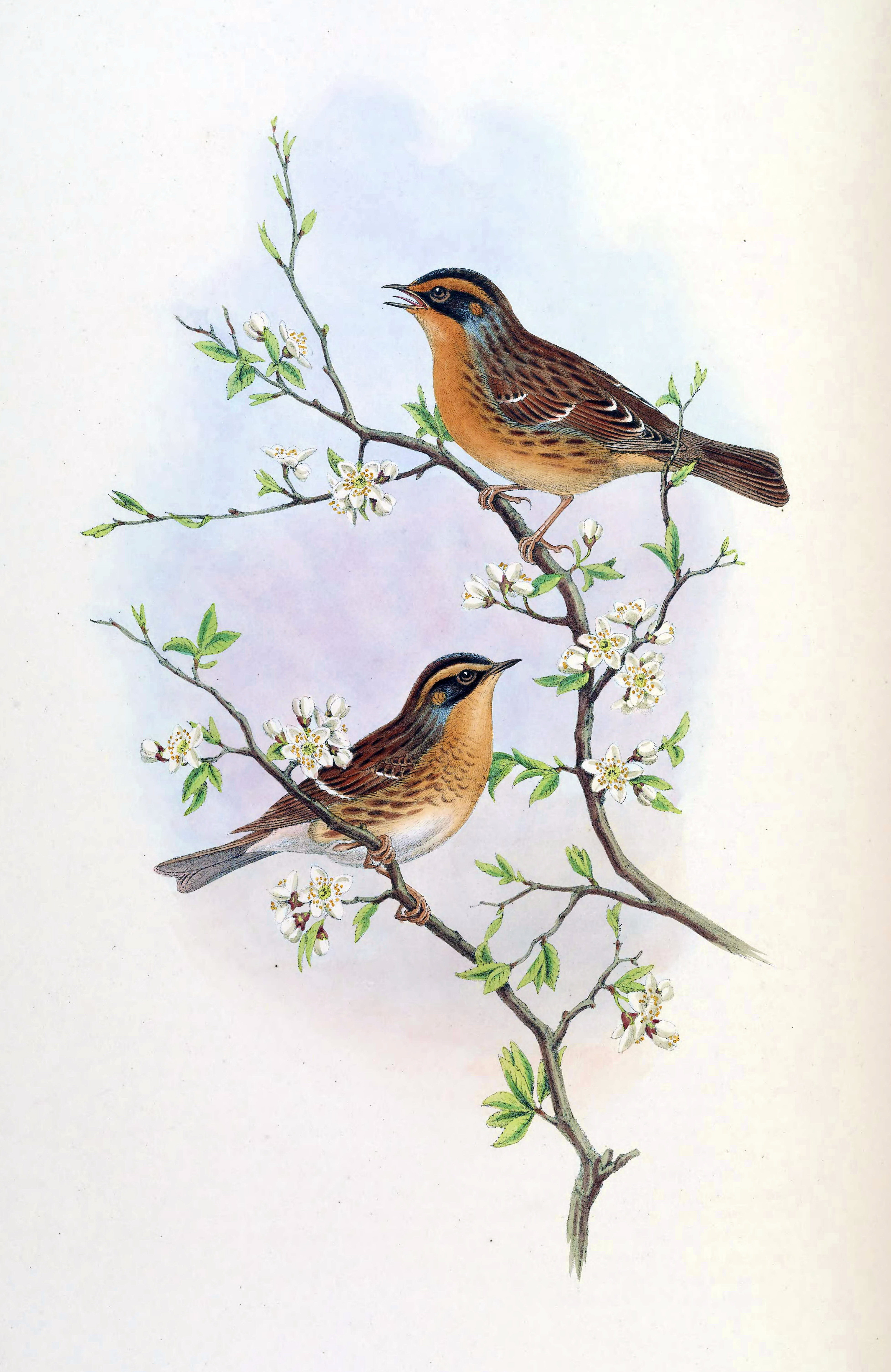 Accentor montanellus = Prunella montanella[1]